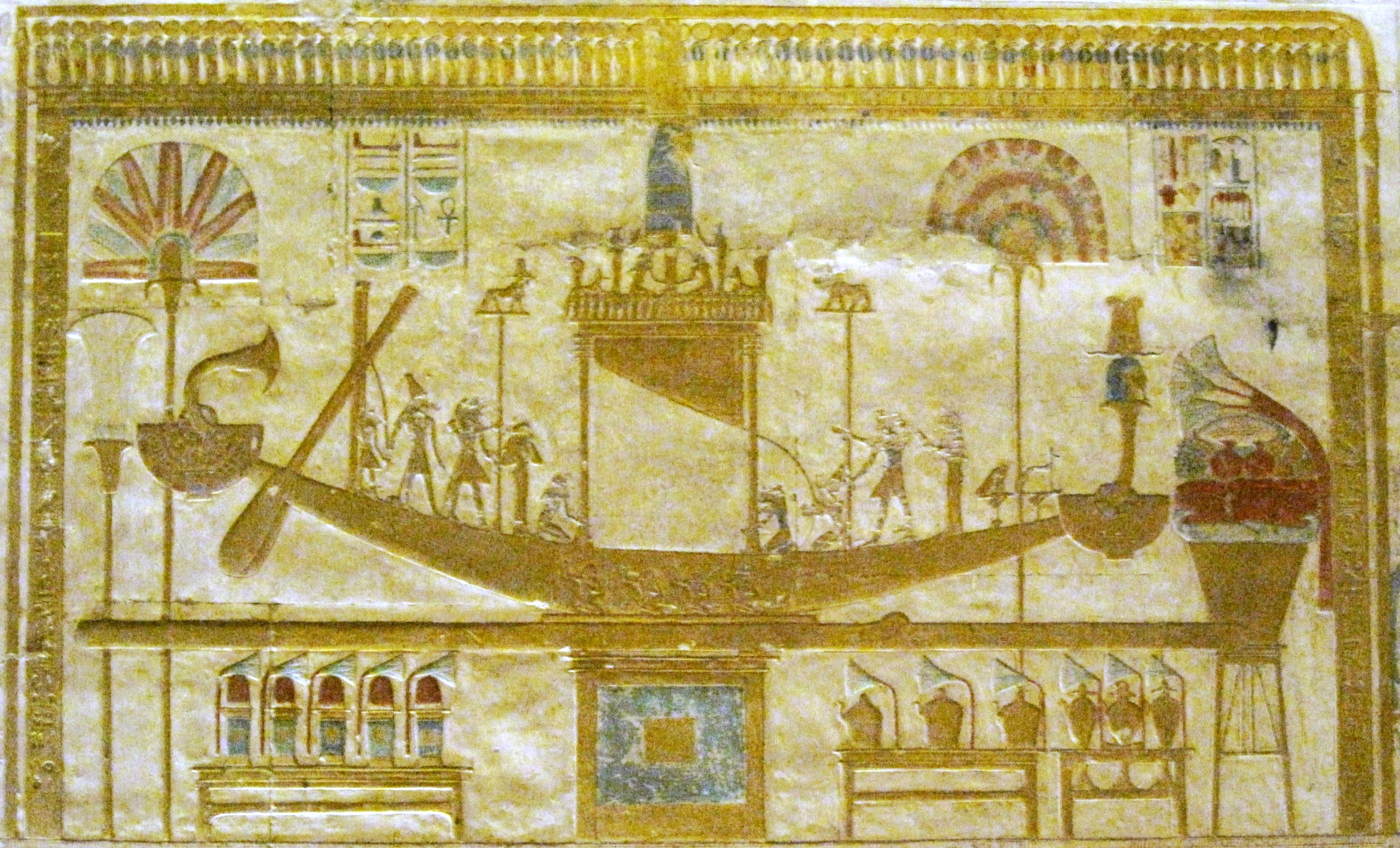 Relief im Totentempel Sethos I. in Abydos, Ägypten